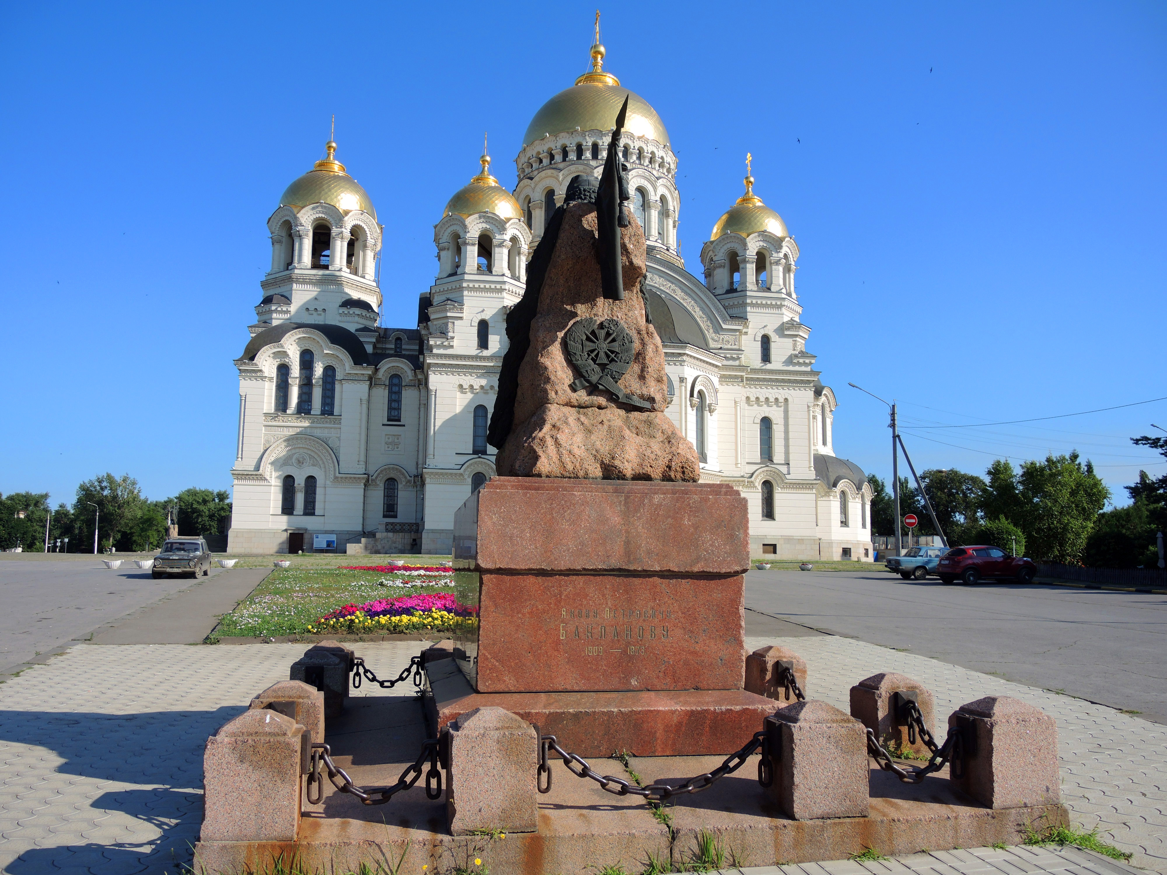 Памятник Я.П. Бакланову - походному атаману кавказских войн: площадь Ермака, 1, Новочеркасск, Ростовская область